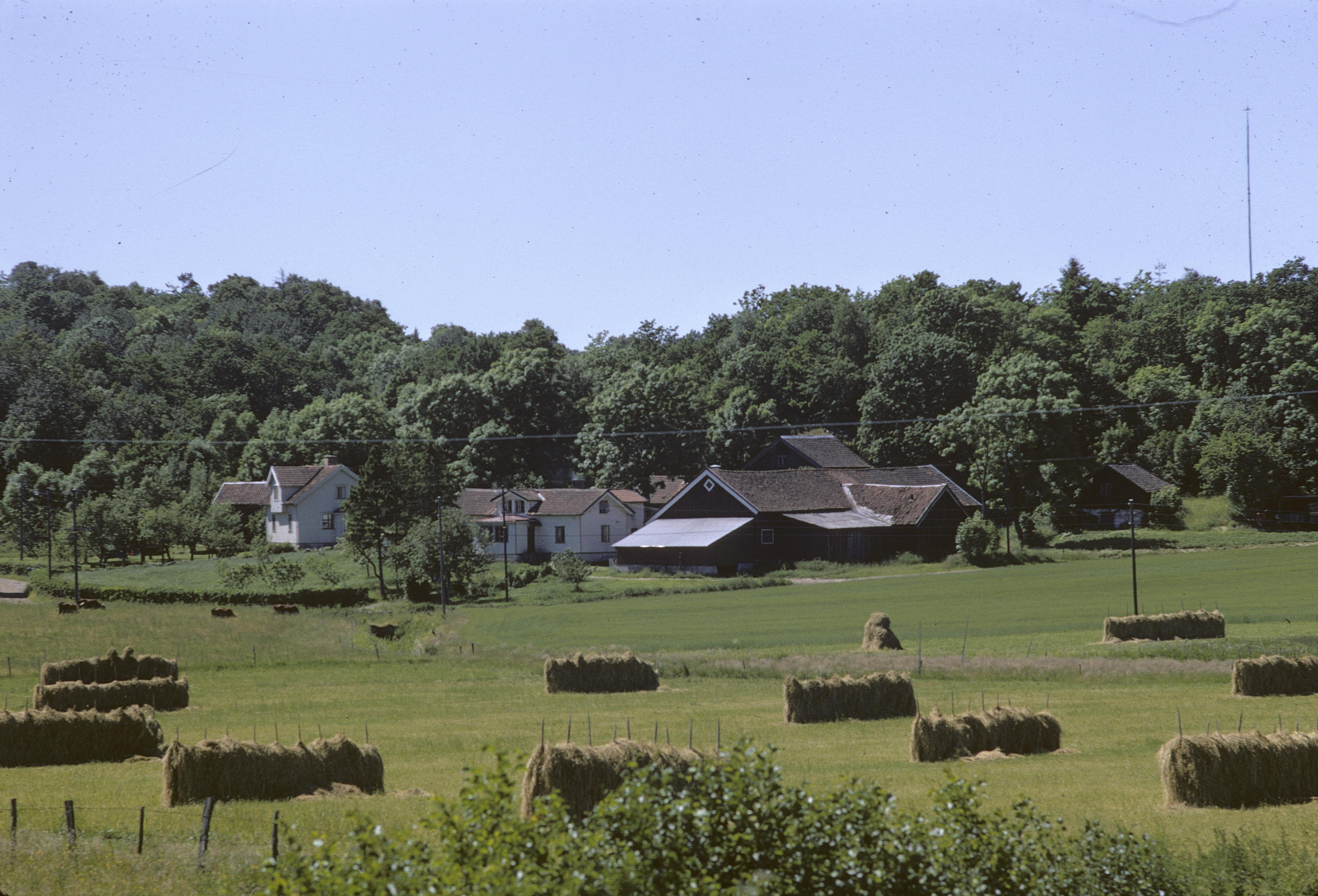 I bakgrunden syns Perssons och Gabrielssons gårdar i Årekärr, juli 1968. Gårdarna ligger kvar där hela Årekärrs by en gång fanns, före skiftesreformerna på 1800-talet. Korna och det skördade höet i förgrunden ligger på Elanders gård, ett säteri där man hade rättare, drängar och svinskötsel.